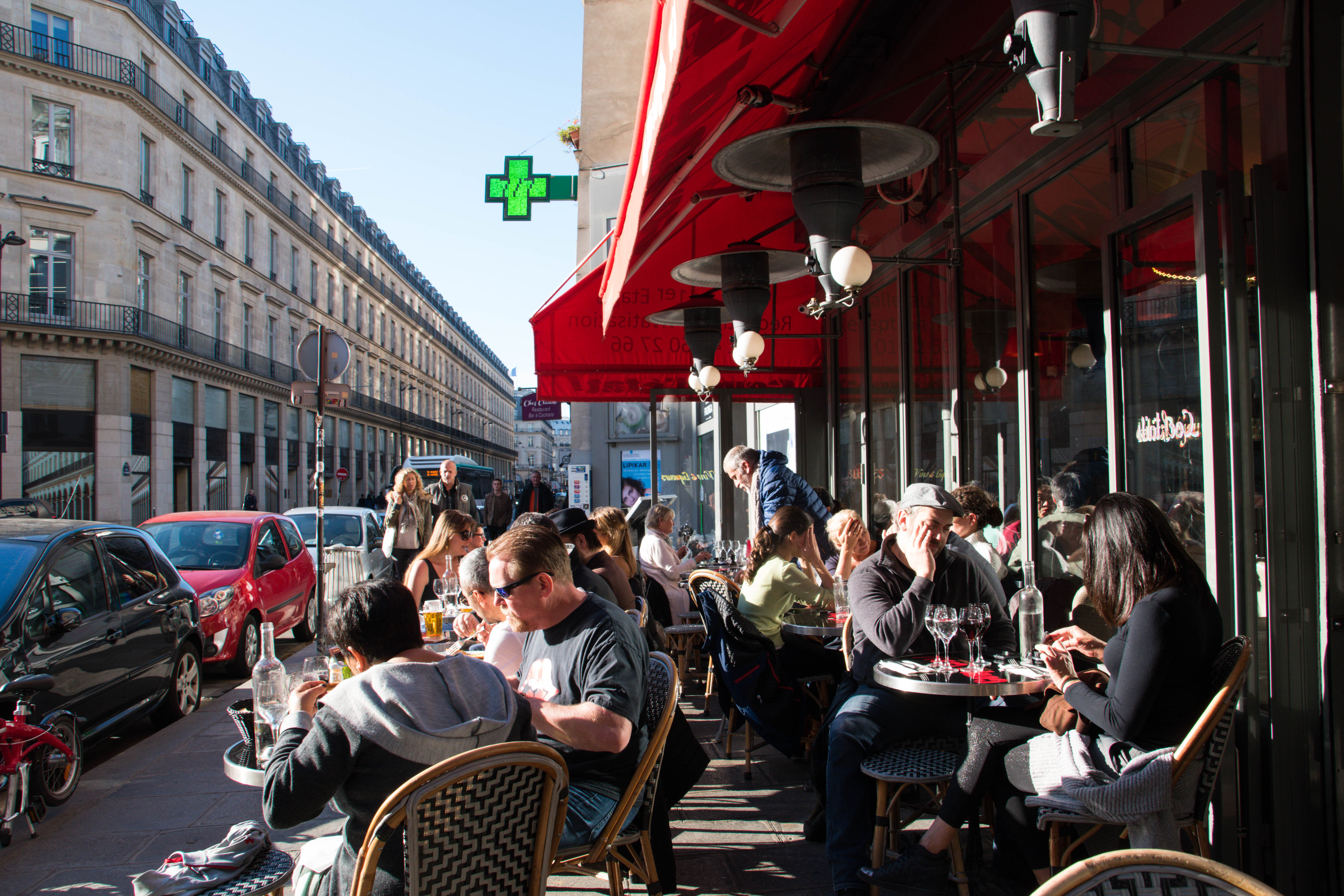 Terrasse animée Bar Brasserie Coup d'état, 164 rue Saint Honoré, Ier arrondissement, Paris, France